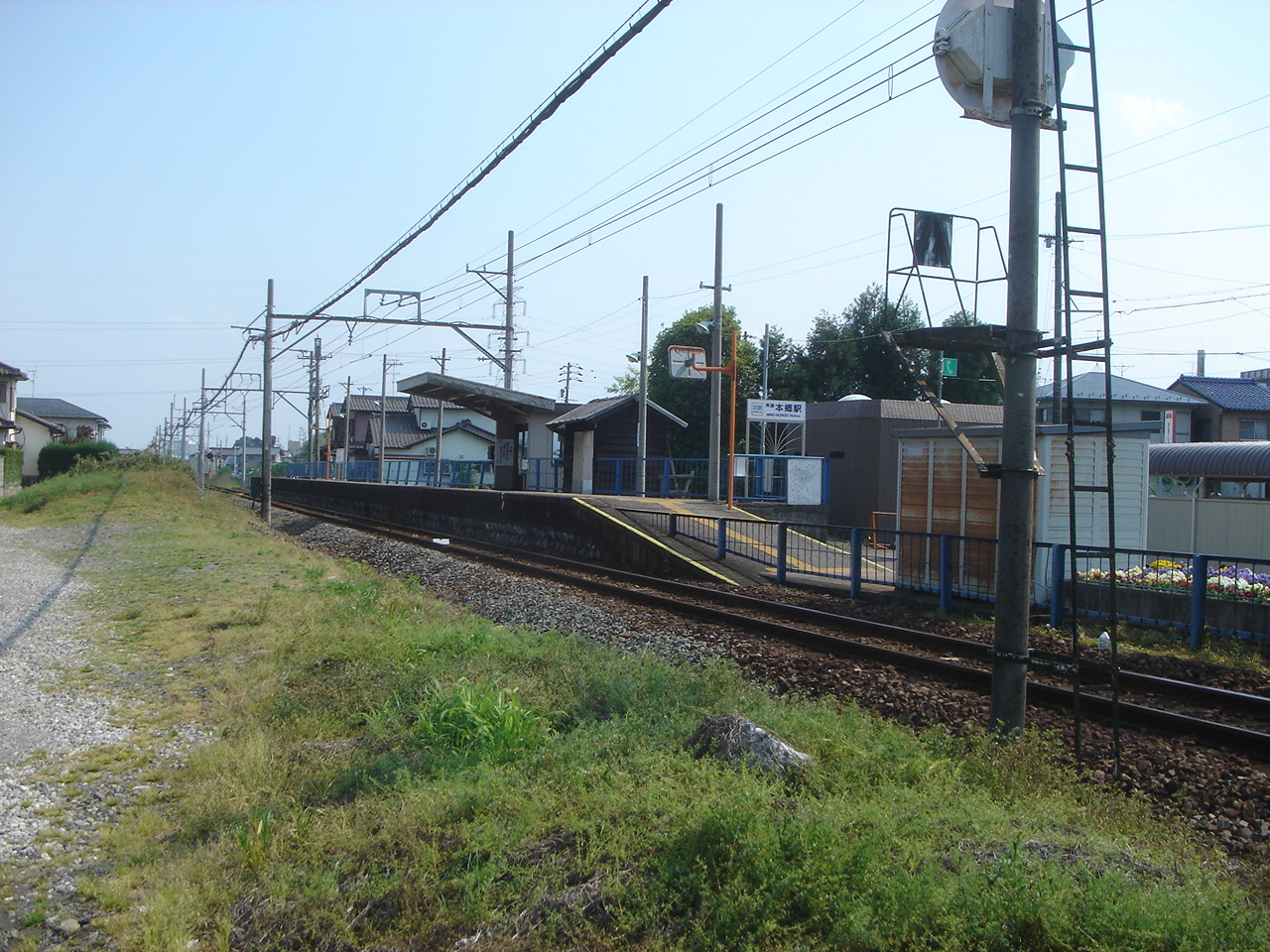 Mino Hongo Eki(美濃本郷駅),Ikeda,Gifu,Japan(岐阜県池田町)で撮影